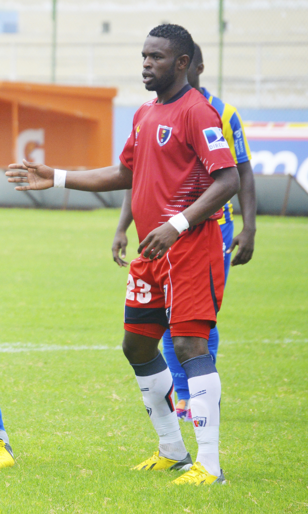 Gary Cortés jugando para Municipal Cañar en 2014